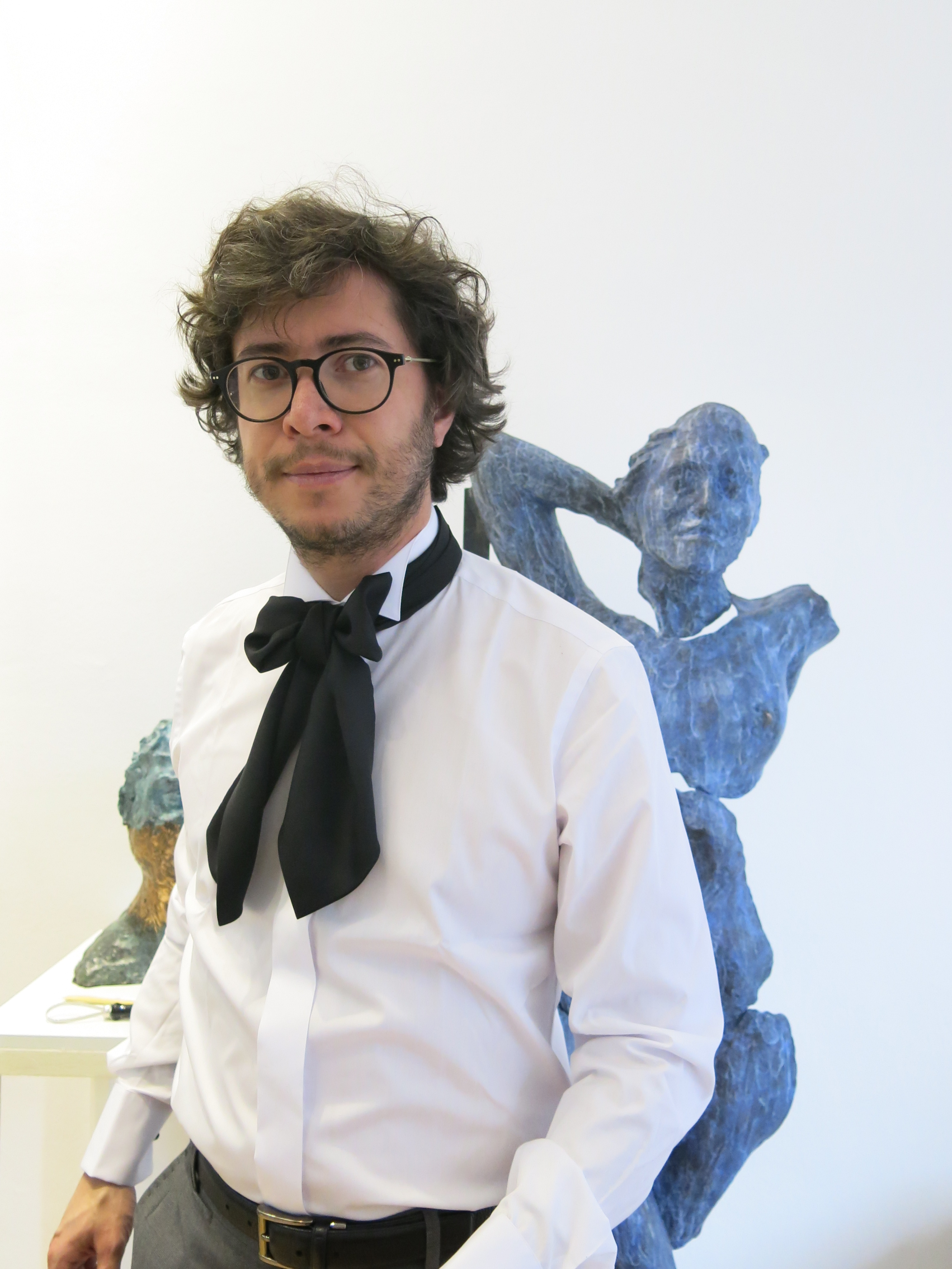 Teddy Cobeña Loor, en su taller